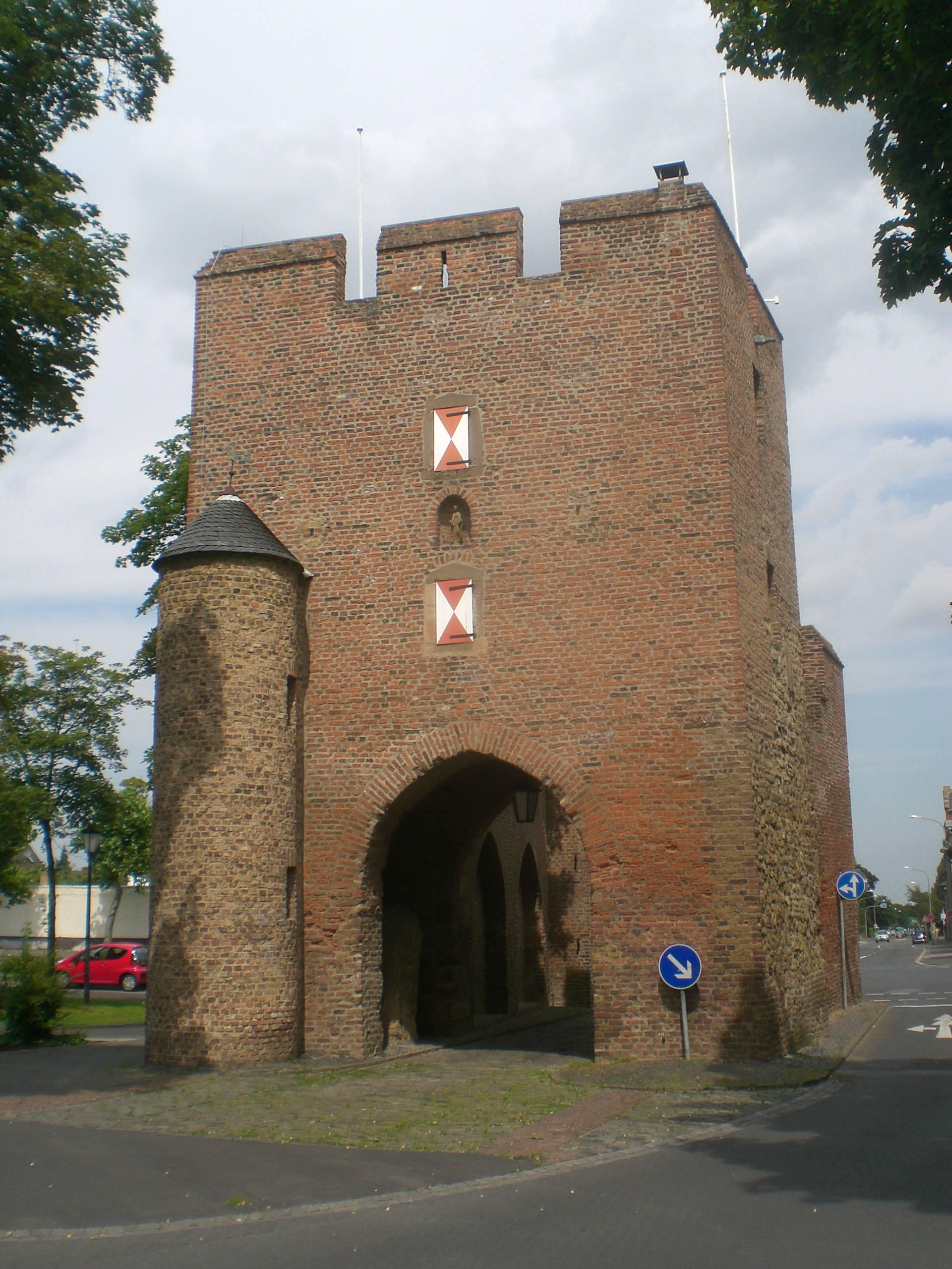 das mittelalterliche Kölntor in Zülpich